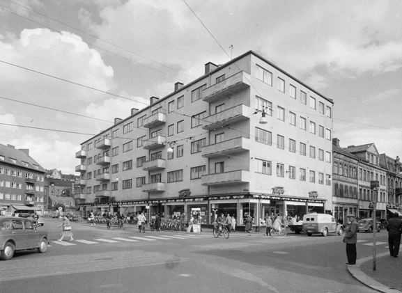 Tempohuset i Helsingborg 1956.